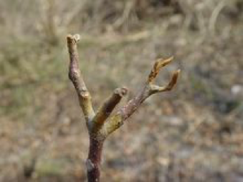 中文（中国大陆）: 核桃枝枯病